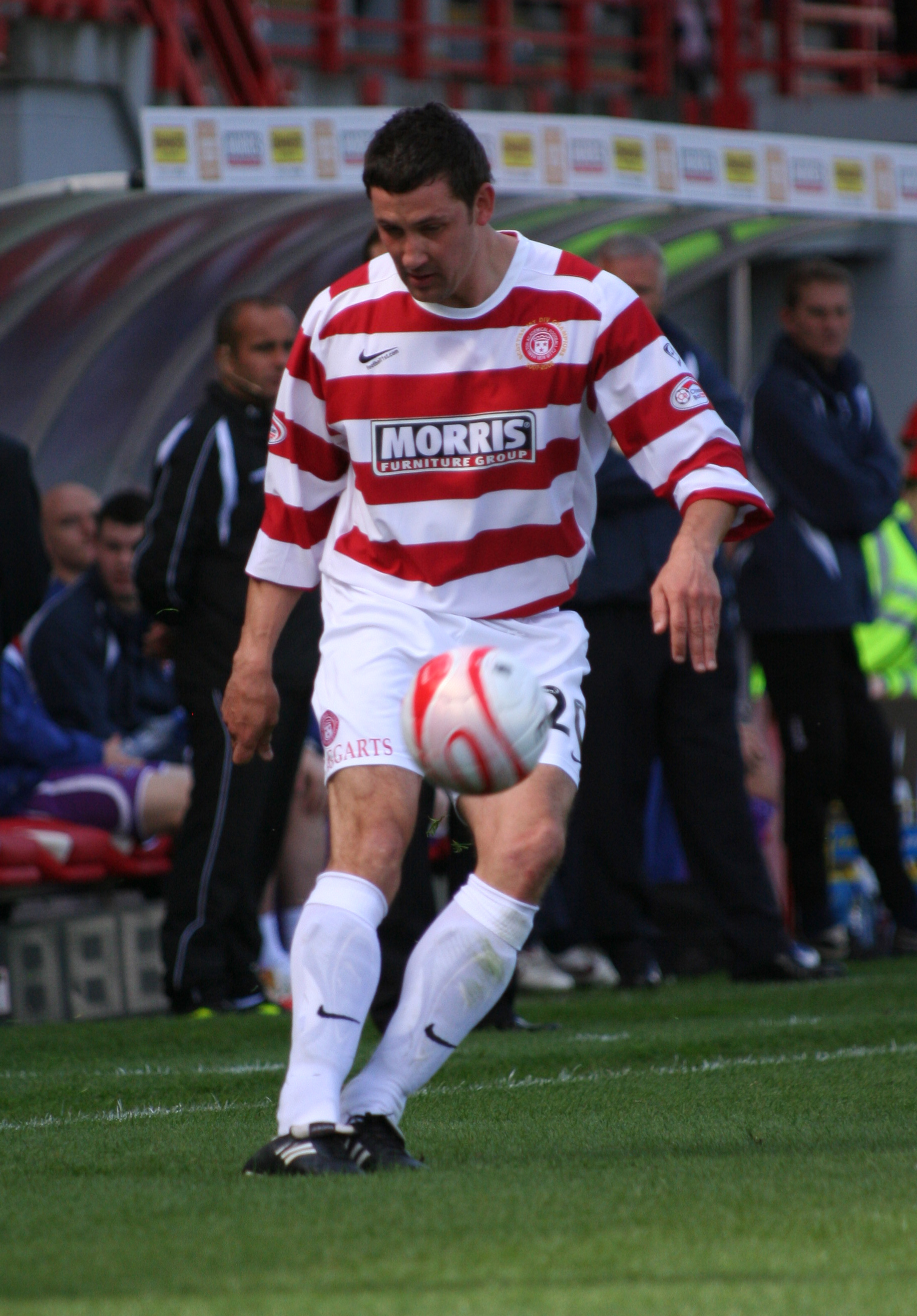 Hamilton vs Kilmarnock